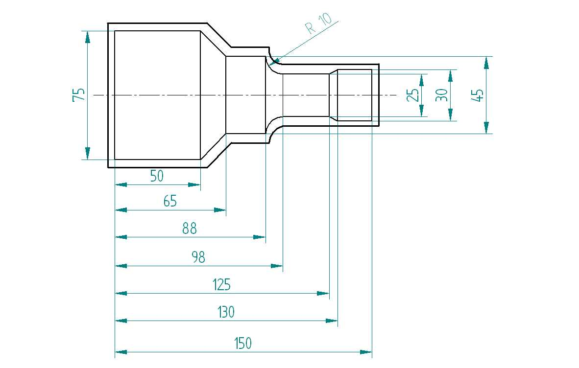 Detail töötlemisvaruga enne puhastöötlust